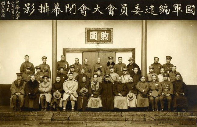 国军编遣委员会大会闭幕摄影，中华民国十八年一月二十五日于国民政府煦园。前排右起：宋子文、朱培徳、何应钦、孙科、李济深、阎锡山、蒋介石、胡汉民、蔡元培、冯玉祥、戴季陶、李宗仁、王树常，中排右二为陈仪、右四为薛笃弼、右六为陈调元、右八为赵戴文、右十为陈布雷、右十二为张群，三排右起：白崇禧、古应芬、孔祥熙、贺耀组、×××、朱绶光、贺国光。